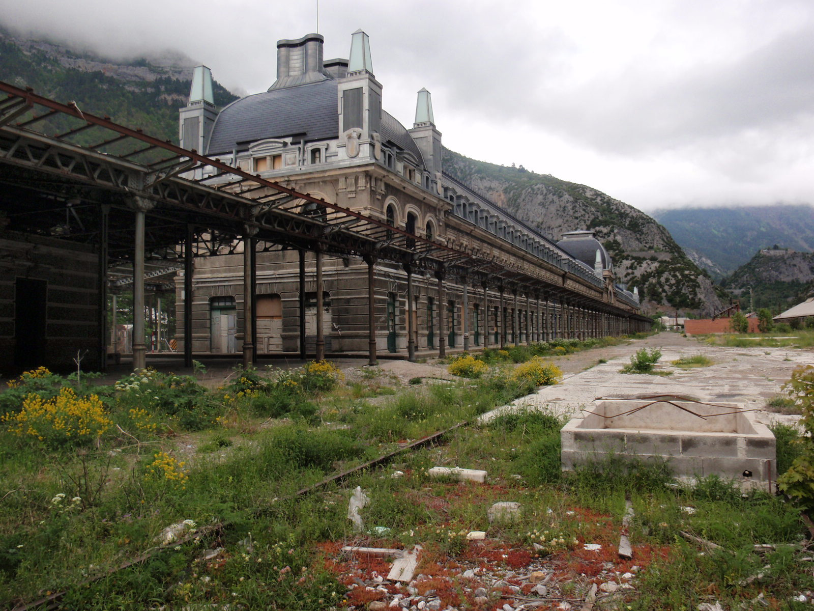 Quai français sud